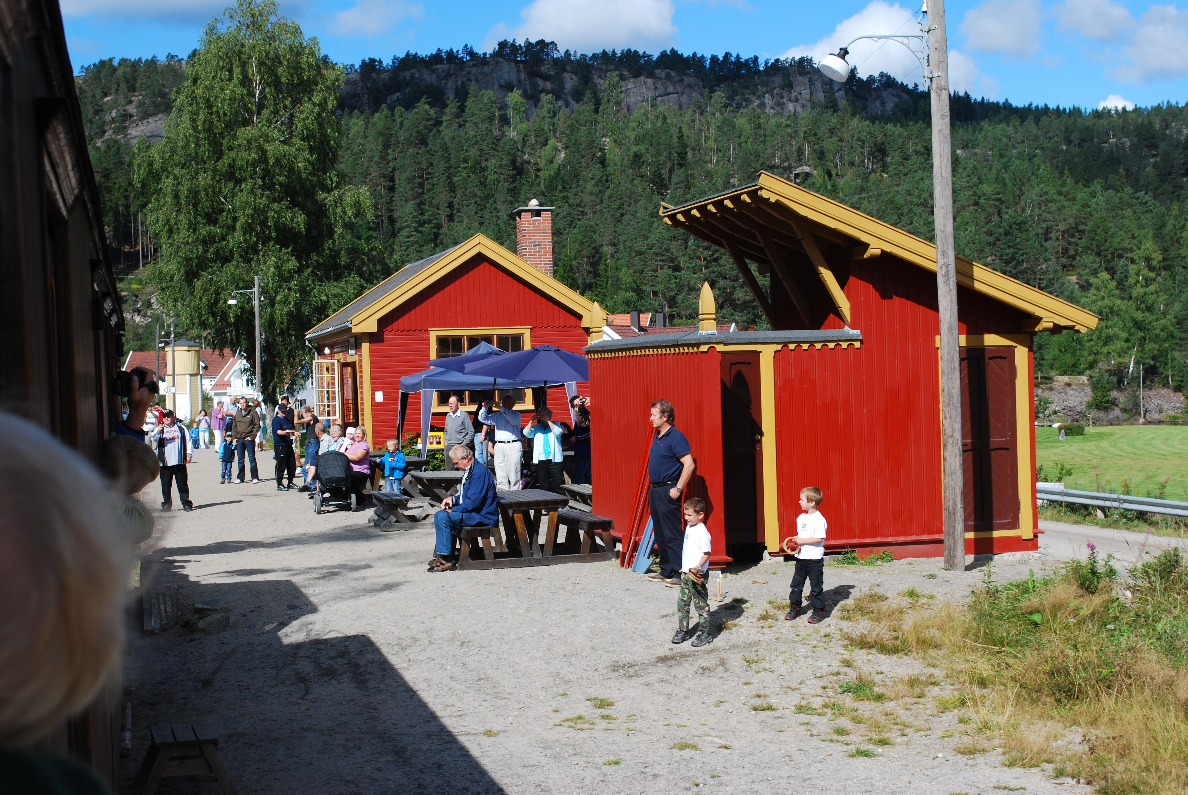 Røyknes